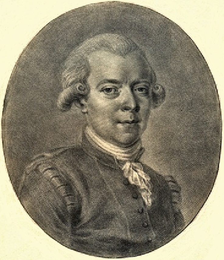 Lars Kristian Tingstadius